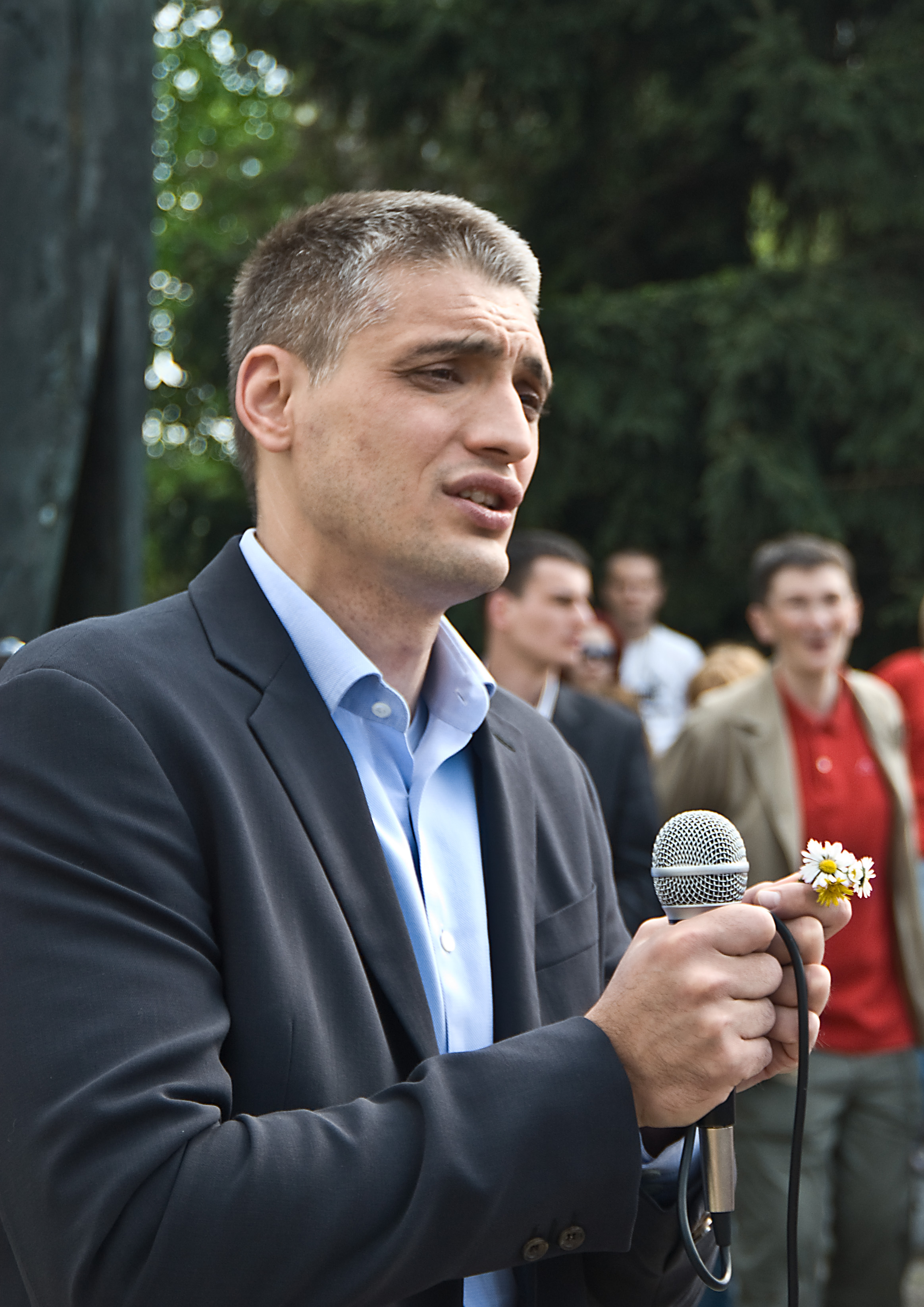 Чедомир Јовановић говори на Тргу Кнеза Михаила у Горњем Милановцу, током предизборне кампање за мајске изборе sr:2008. Снимио Ранко Томић.